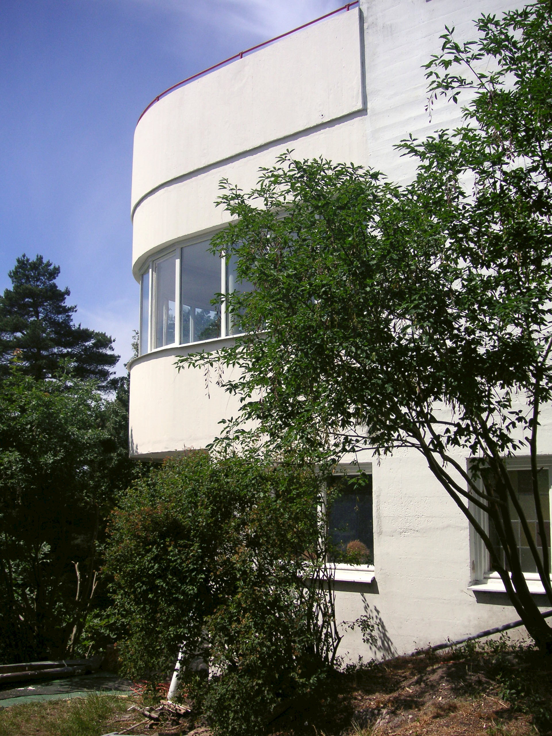 "Villa Markelius" i Stockholm (Nockeby). Arkitelt Sven Markelius egen villa från 1930